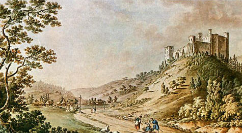 Widok ruin zamku w Tęczynie w 1794 r. na akwareli Z. Vogla